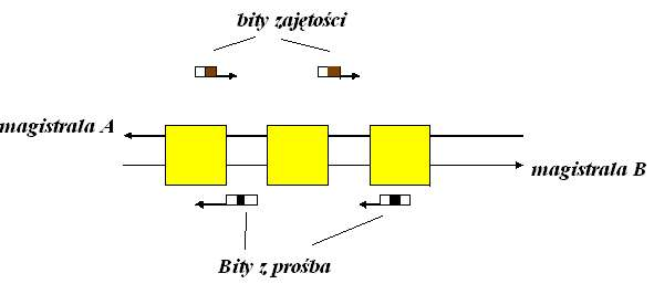 dqdb